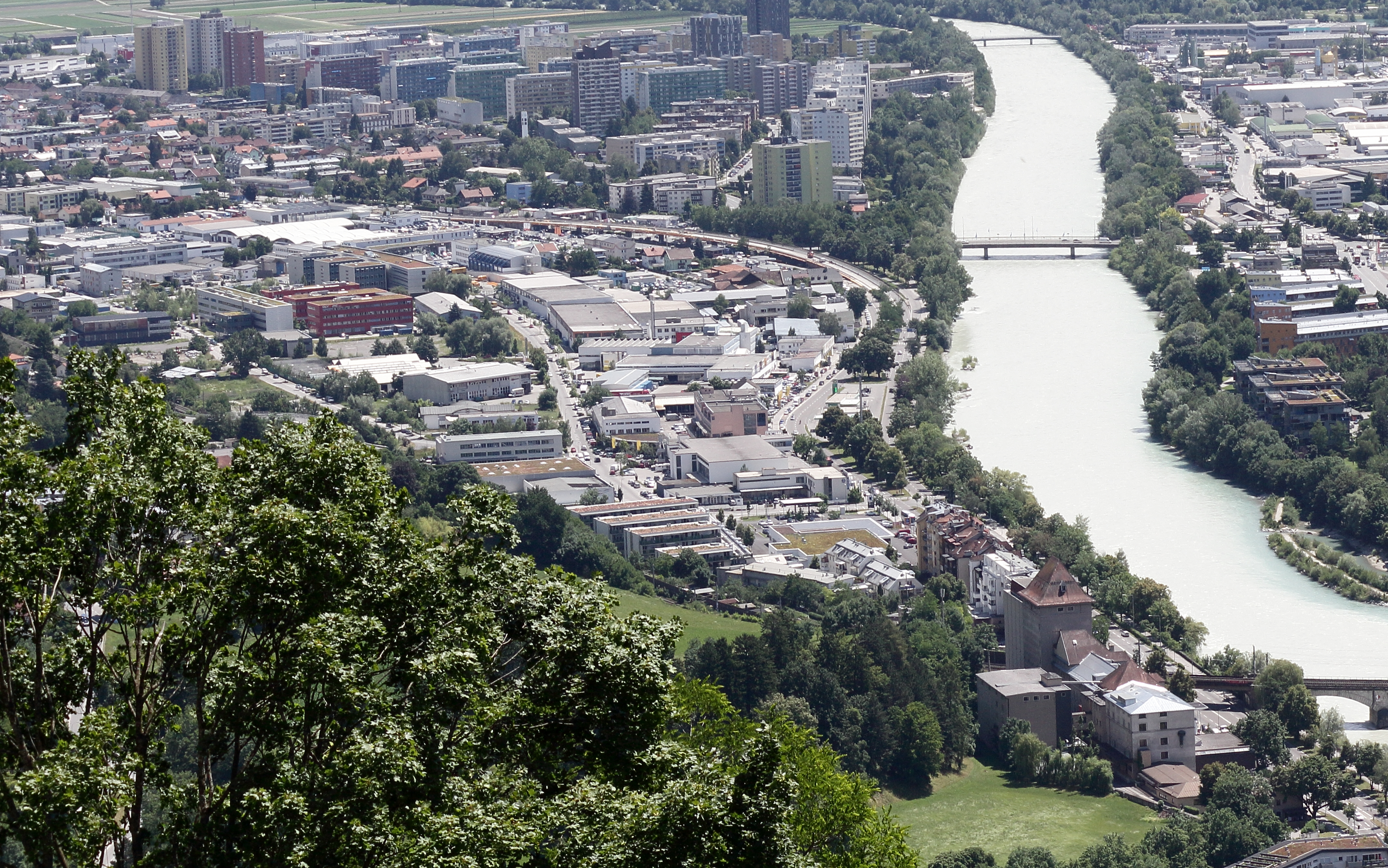 Innsbruck